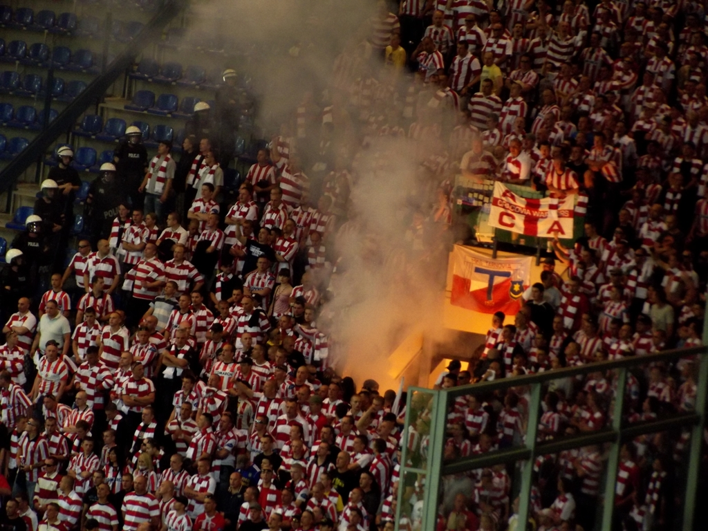 Zdjęcie zrobione podczas 185. derbów Krakowa pomiędzy Wisłą a Cracovią.